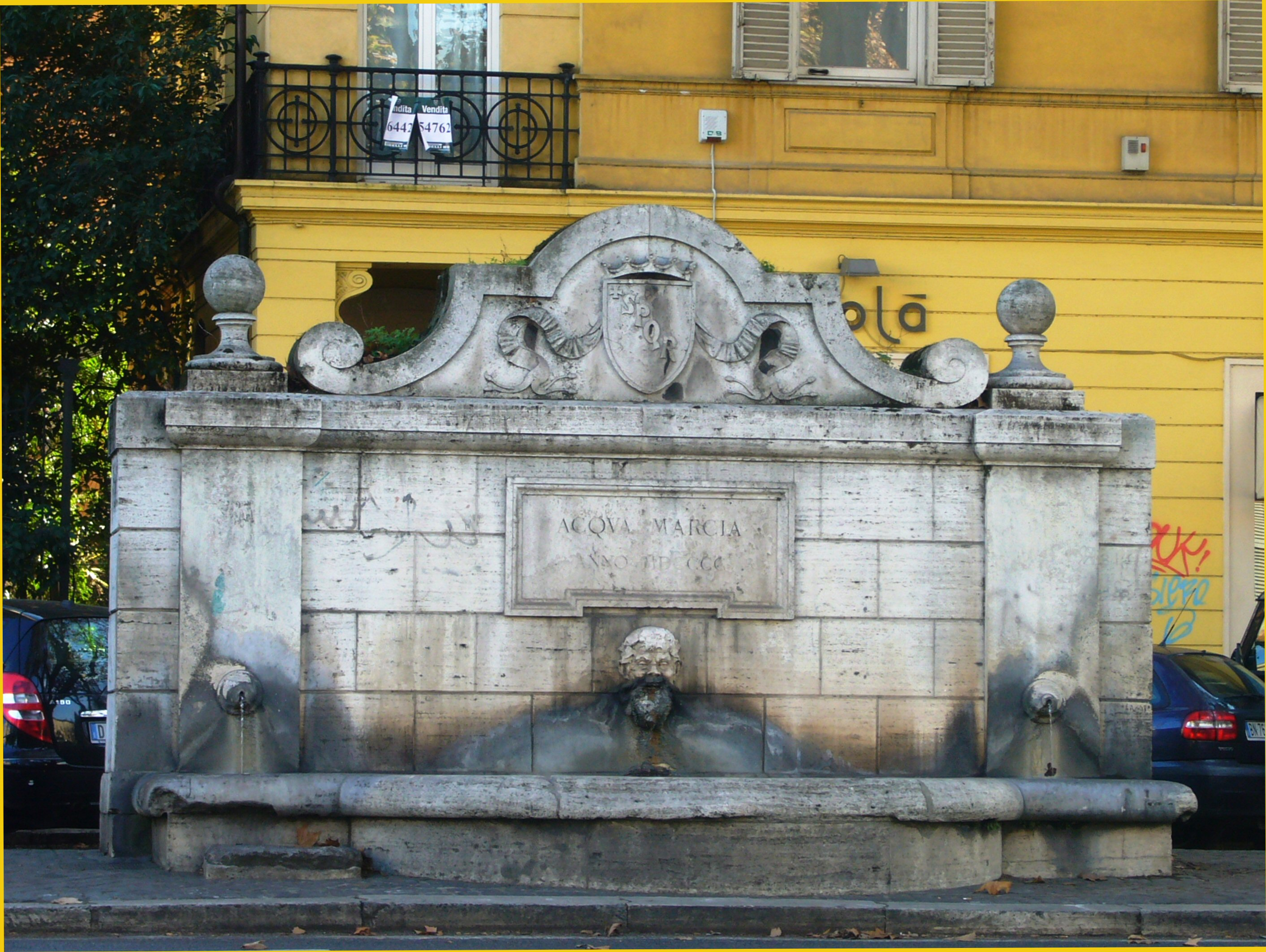 Roma, via Nomentana 162: Fontanile dell'Acqua Marcia (1900)